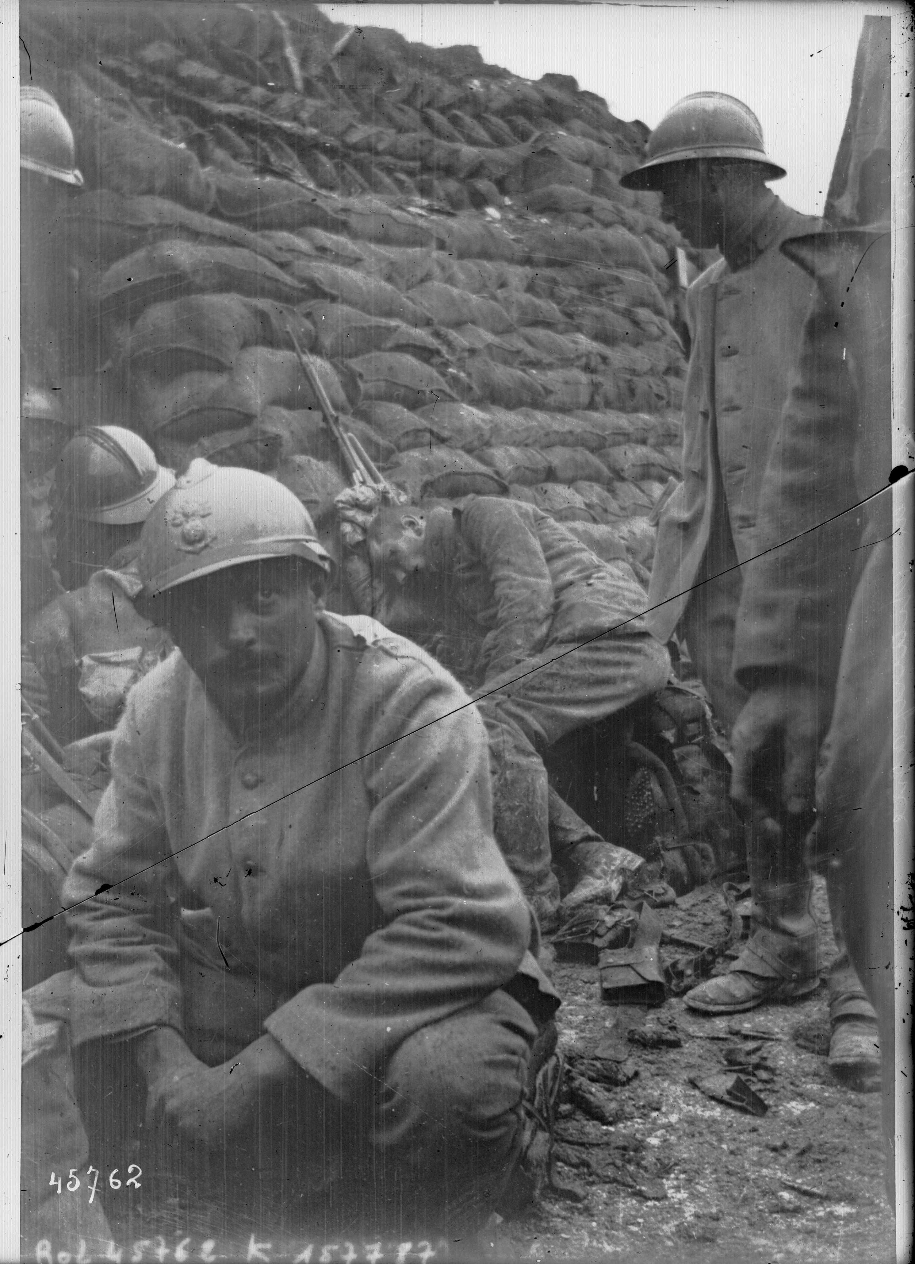 Tranchée de 1ère ligne en Champagne : [photographie de presse] / [Agence Rol]